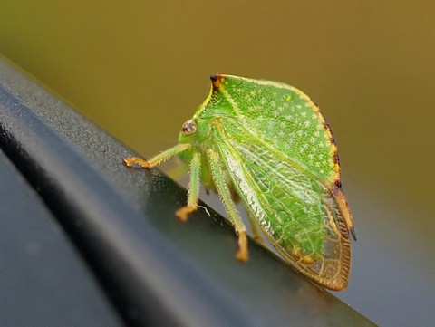 Büffelzikade (Stictocephala bisonia) nördlich von Frankfurt an einem Niddaarm